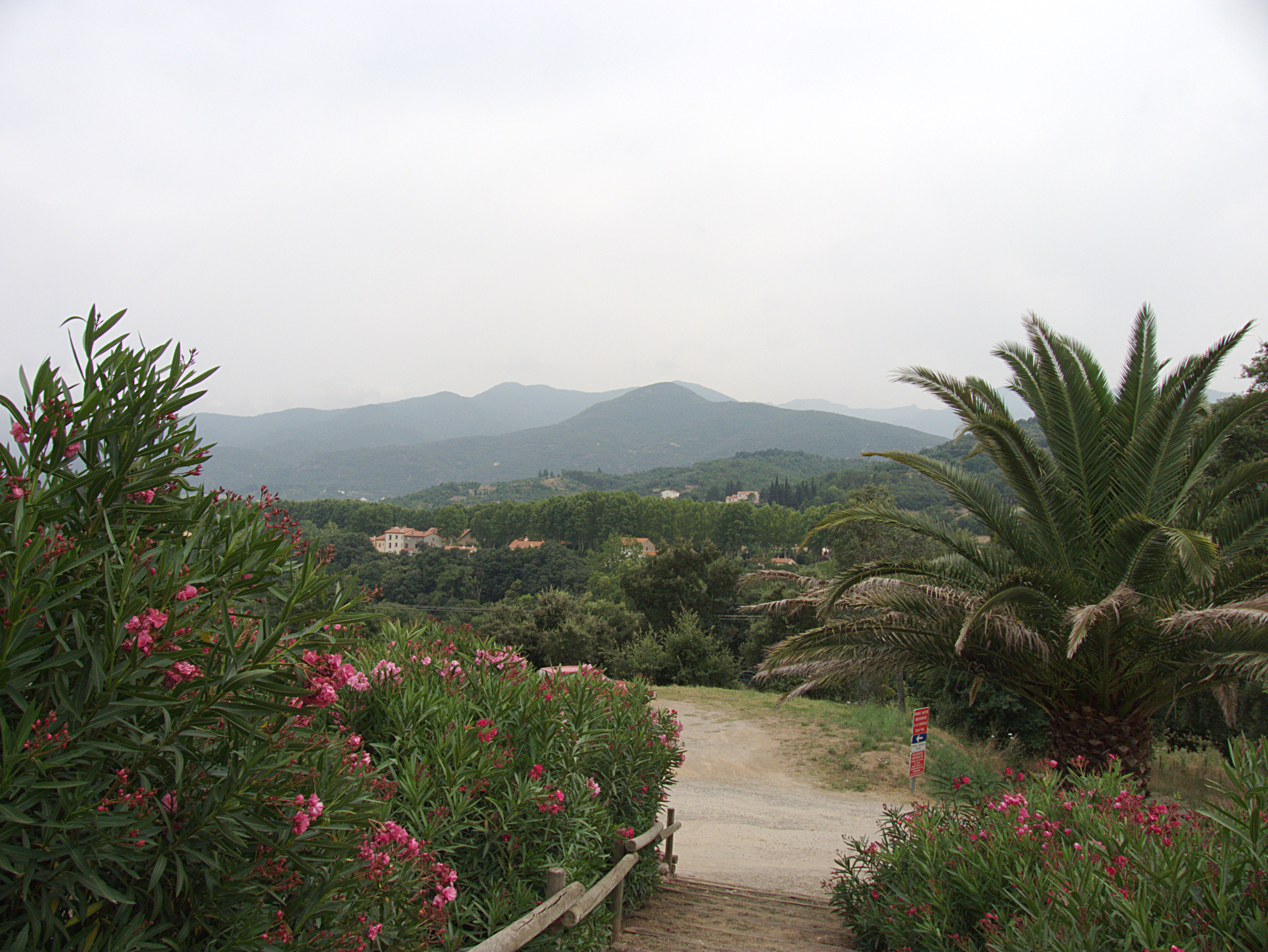 Sortie de la chapelle Saint-Paul, Reynès (Pyrénées-Orientales, Languedoc-Roussillon, France)